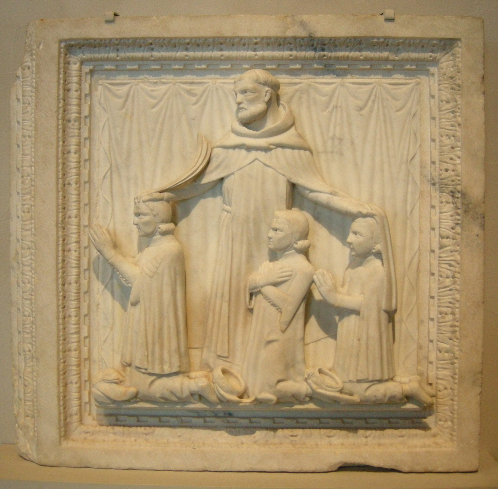 San pietro martire e tre committenti, giovanni di balduccio, milano, 1340 circa